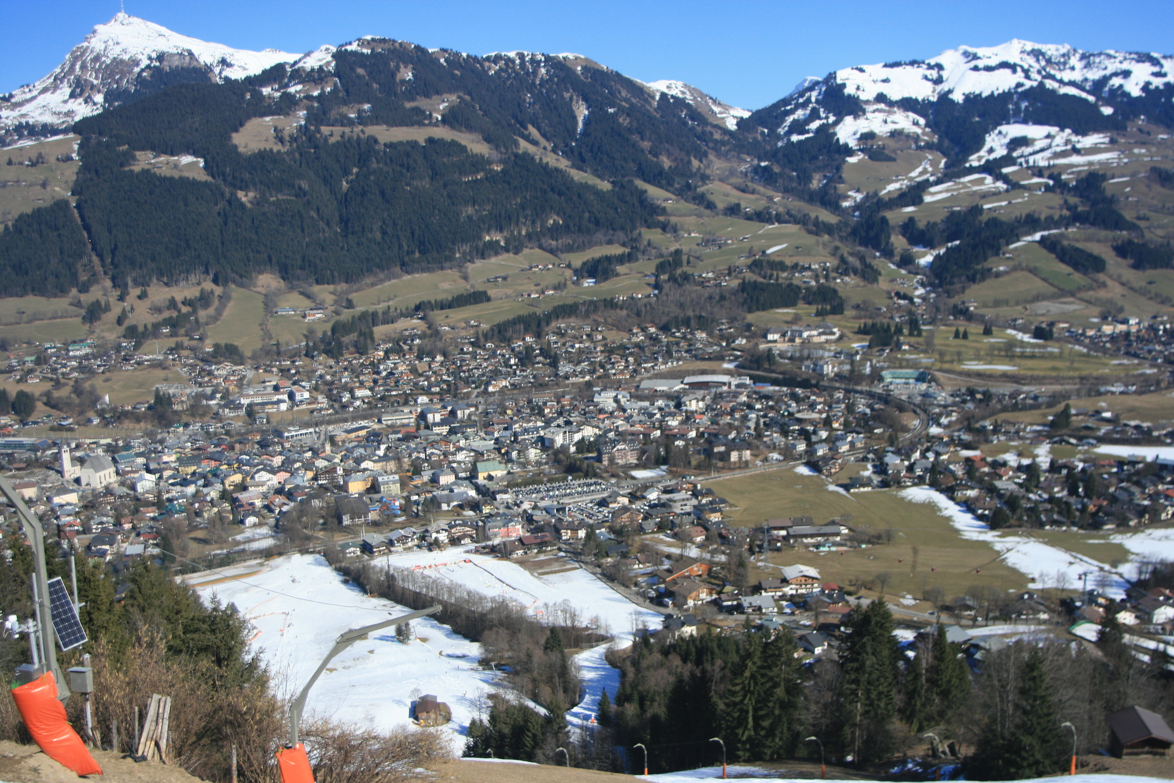 6370 Kitzbuhel, Austria